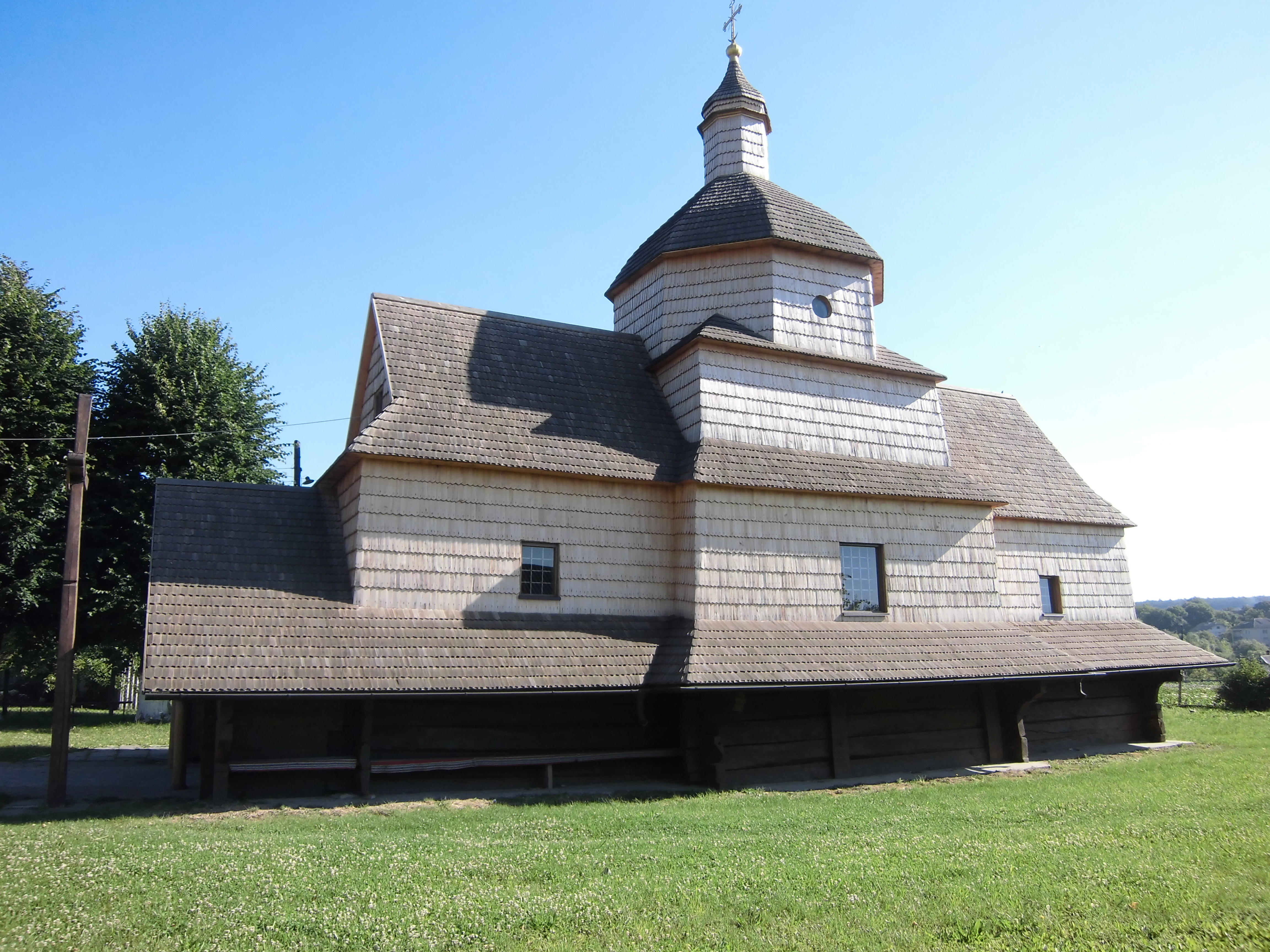 Церкви Воздвиження Чесного Хреста в м.Копичинці